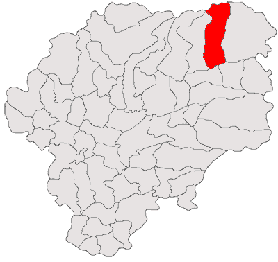 Categorie:Hărţi ale judeţului Bistriţa-Năsăud